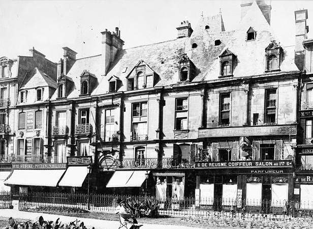 Façade de l'hôtel d'Escoville sur la place Saint-Pierre au début du XXe siècle.